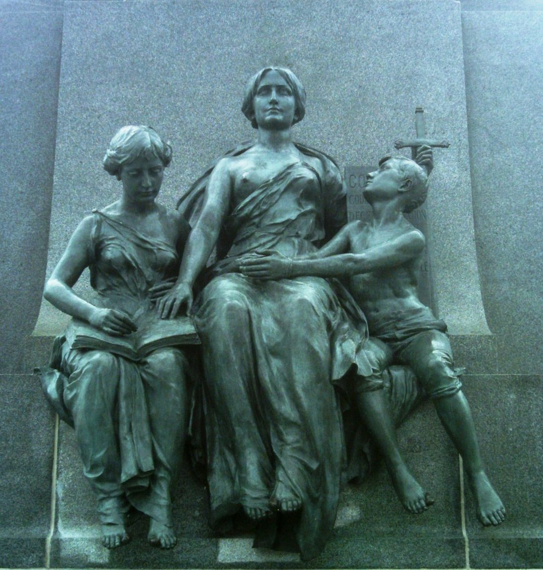 Détail Nord du Monument à George-Étienne Cartier à Montréal. Les figures représentent la Législation.